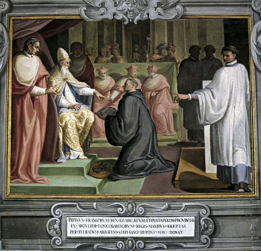 La donation de Pépin le Bref au Pape Étienne II (ou traité de Quierzy), en 754, crée les États pontificaux.